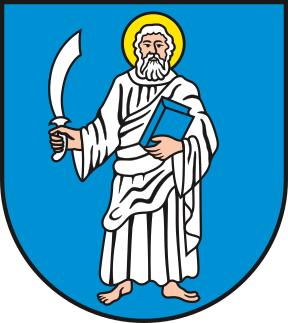 Wappen von Edersleben